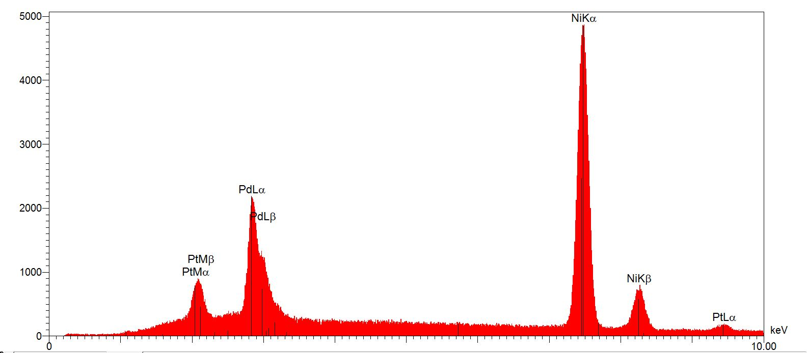 Braun Sixtant SM3 EDX Spektrum Scherfolie Oberseite im R.E.M. Mikroskop